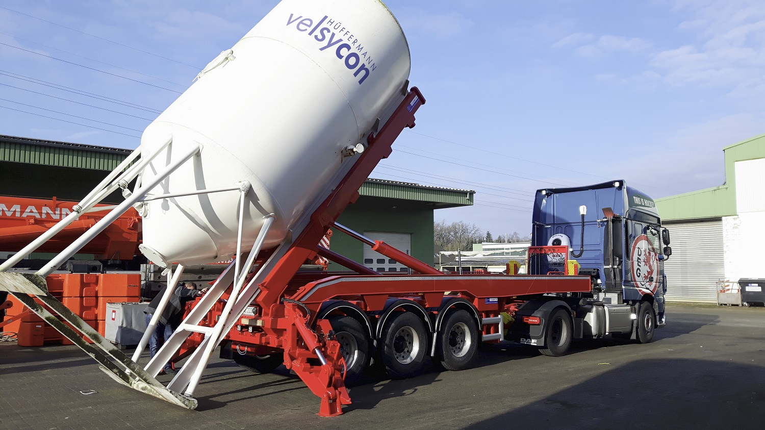 2-achsiger Sattelsilosteller